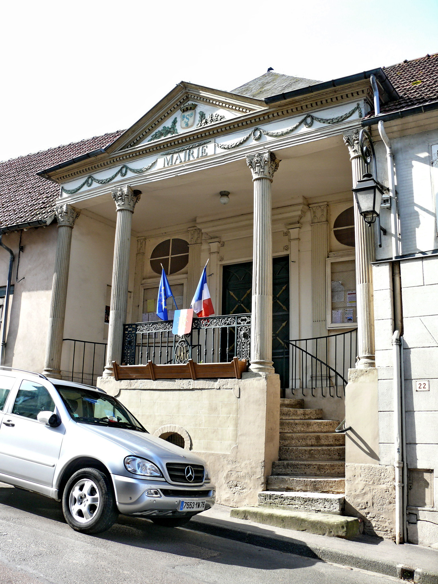 Ancienne Mairie de Songeons (Oise, Picardie, France)